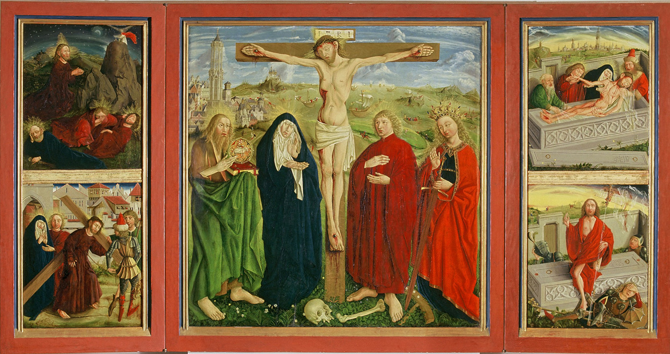 Feldbacher Altar, spätgotischer Passionsaltar, Historisches Museum Thurgau